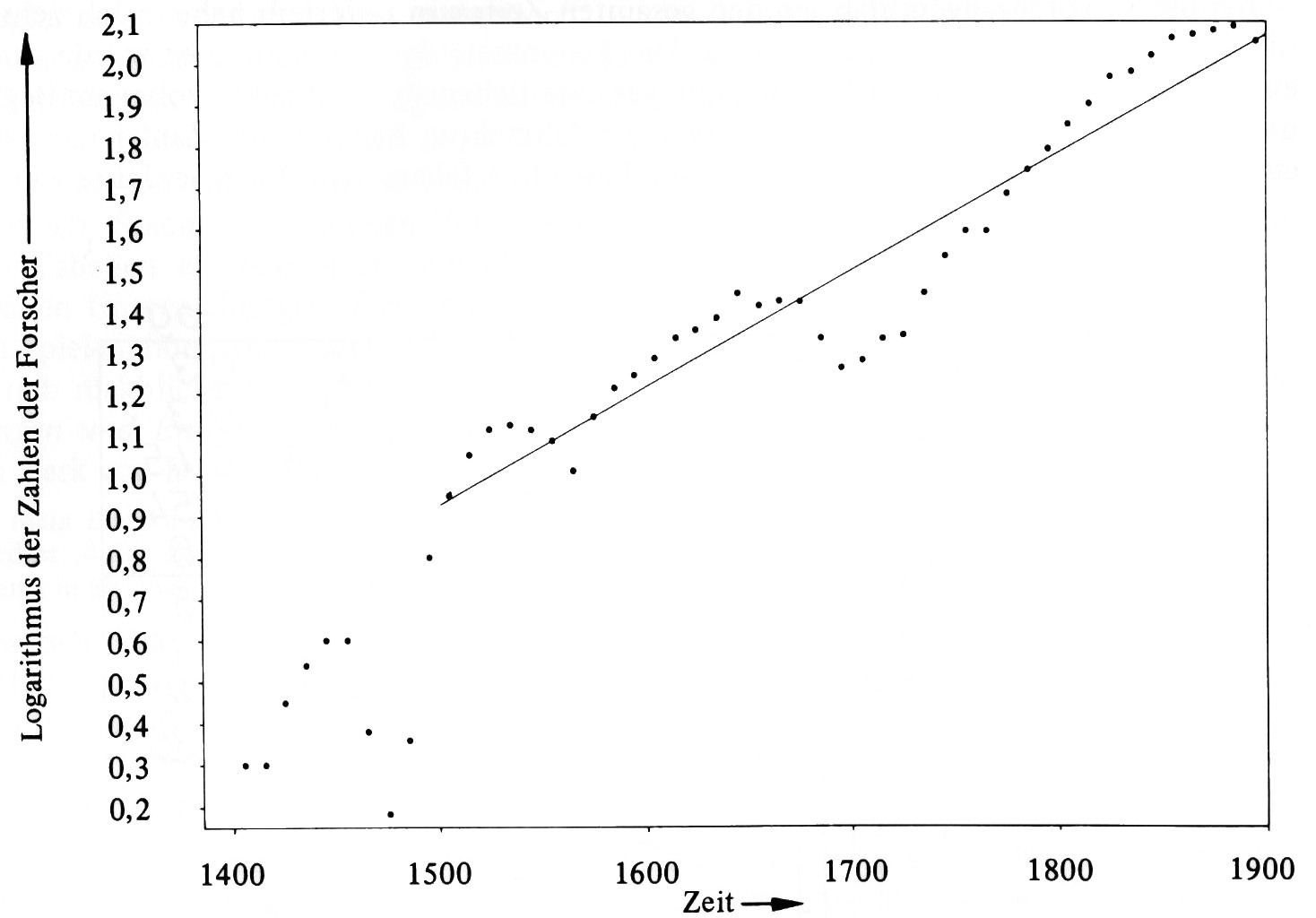 Schaubild für die Zunahme bedeutender Naturforscher im Laufe der Neuzeit